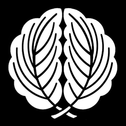 「抱き柏」紋（染抜）